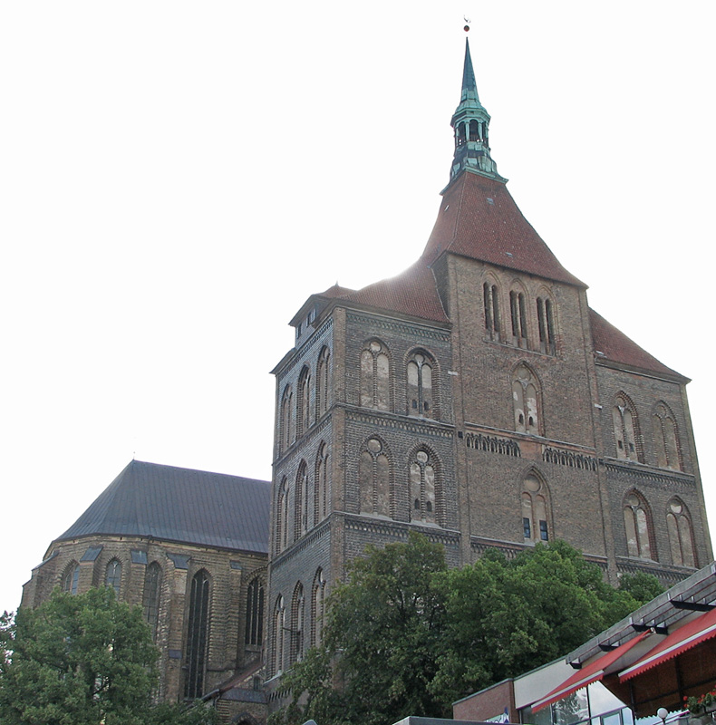 Beschreibung: St. Marien Kirche in Rostock, Germany Fotograf: Darkone, 17. August 2005